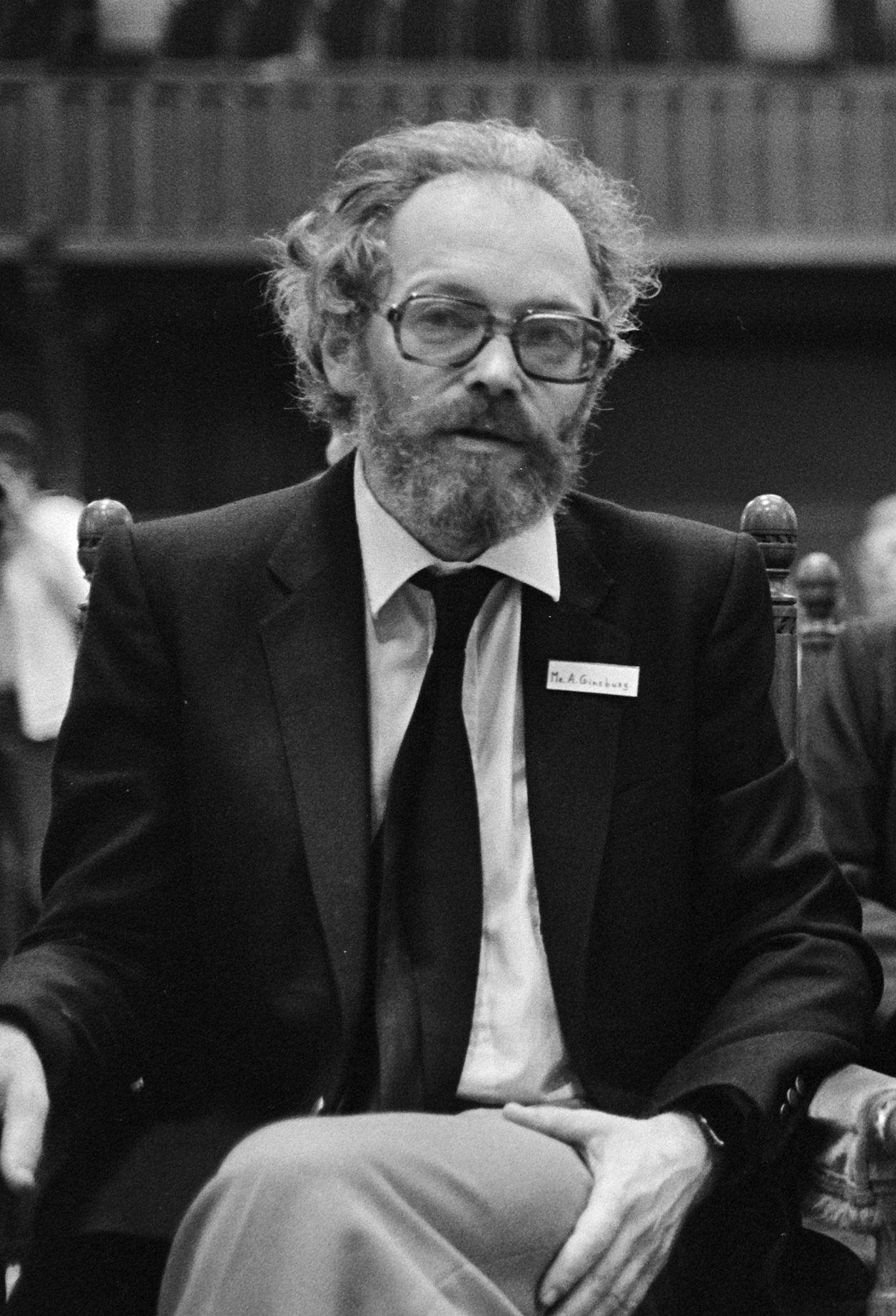 Het Sacharov-tribunaal te Den Haag , de dissidenten Alexader Ginsburg